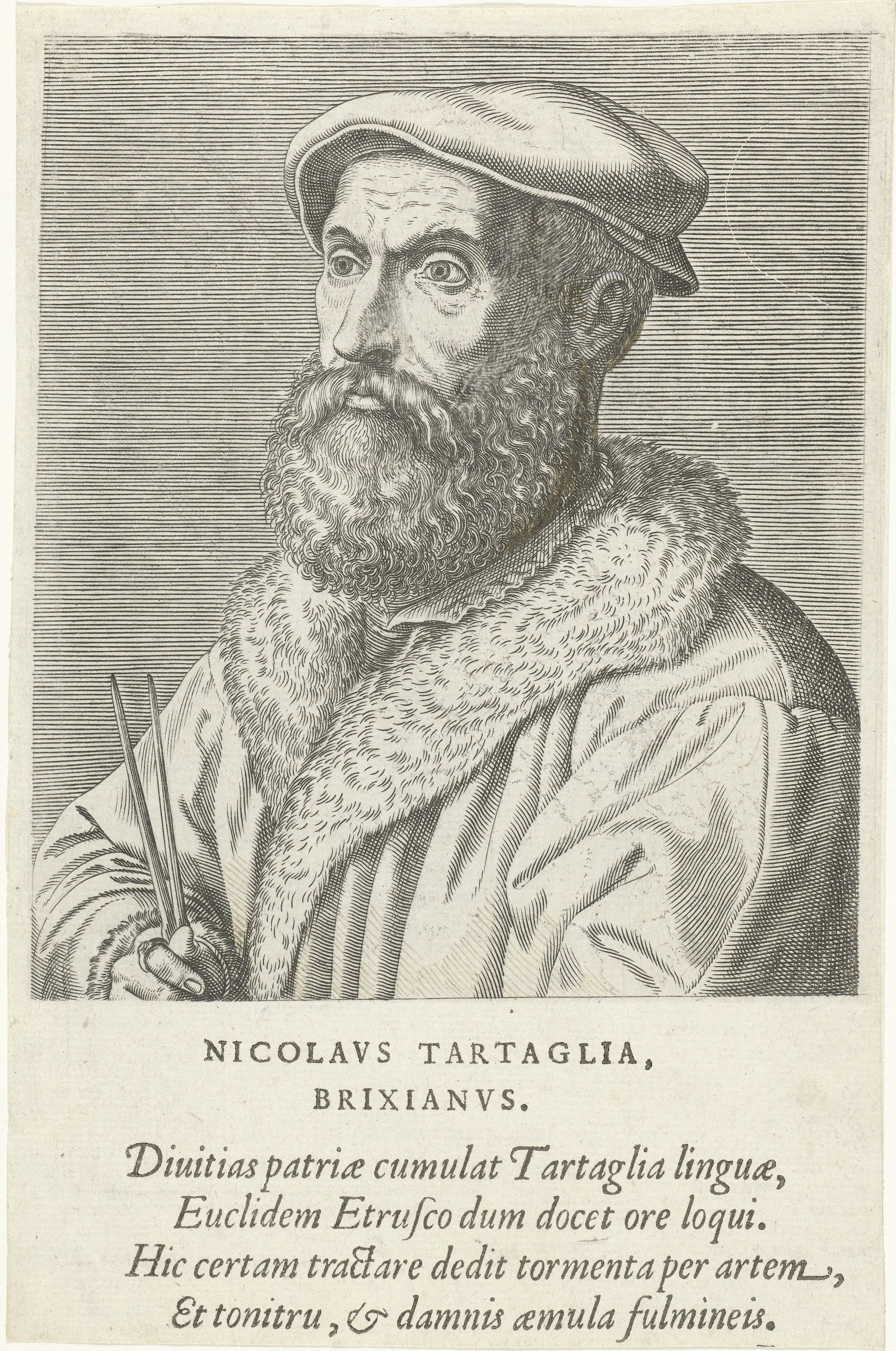 IdentificatieTitel(s): Portret van Niccolo TartagliaNicolavs Tartaglia Brixianvs (titel op object)Portretten van beroemde Europese geleerden (serietitel)Virorum doctorum de Disciplinis benemerentium effigies (serietitel)Objecttype: prent Objectnummer: RP-P-1909-4459Catalogusreferentie: New Hollstein Dutch 679-2a(2)Opschriften / Merken: verzamelaarsmerk, verso midden onder, gestempeld: Lugt 2228Omschrijving: Portret van Niccolo Tartaglia, een beroemde Italiaanse wiskundige. Buste naar links. De prent heeft een Latijns onderschrift en maakt deel uit van een serie van beroemde Europese geleerden.VervaardigingVervaardiger: prentmaker: Philips Galleschrijver: Benedictus Arias Montanusdrukker: Christoffel Plantijnuitgever: Philips GallePlaats vervaardiging: AntwerpenDatering: 1572Fysieke kenmerken: gravure en boekdrukMateriaal: papier Techniek: graveren (drukprocedé) / boekdrukAfmetingen: blad: h 195 mm × b 128 mmOnderwerpWie: Niccolo TartagliaVerwerving en rechtenVerwerving: aankoop 1905Copyright: Publiek domein